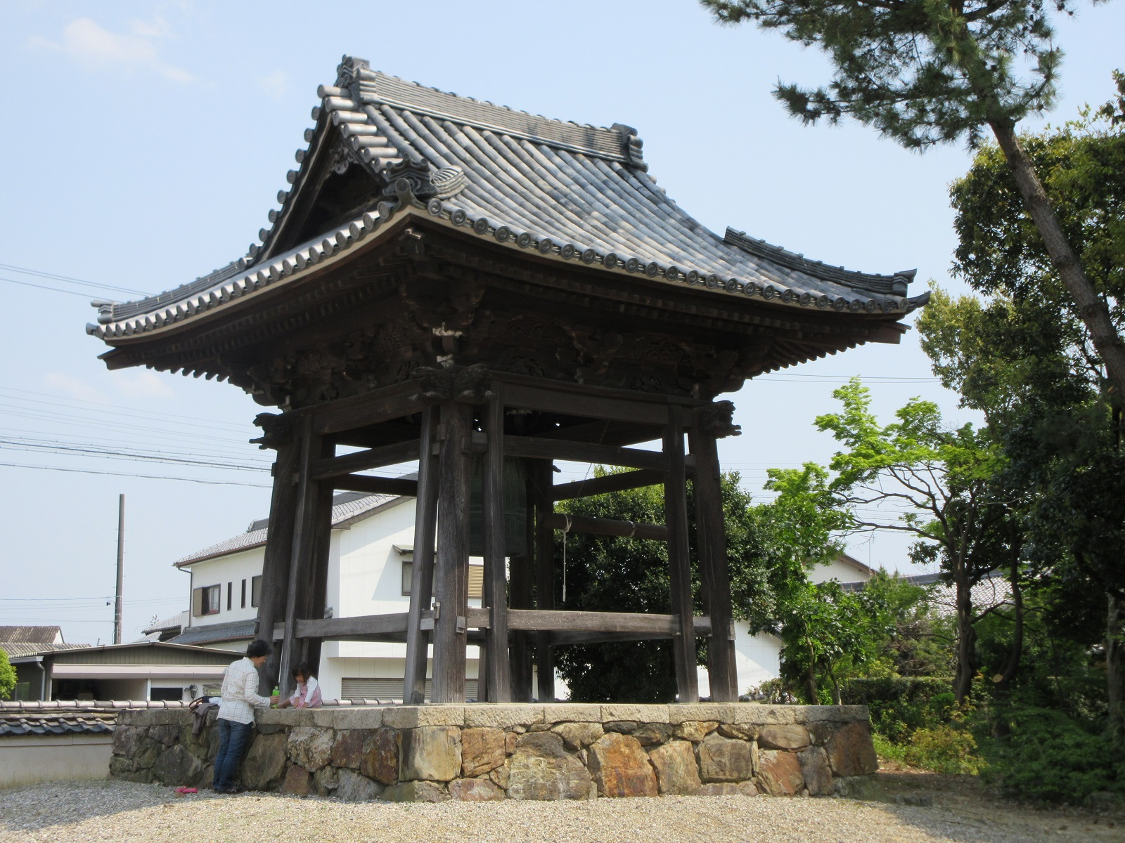 本證寺（安城市野寺町）